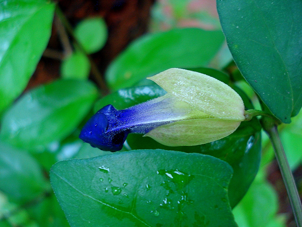 Clitoria ternatea